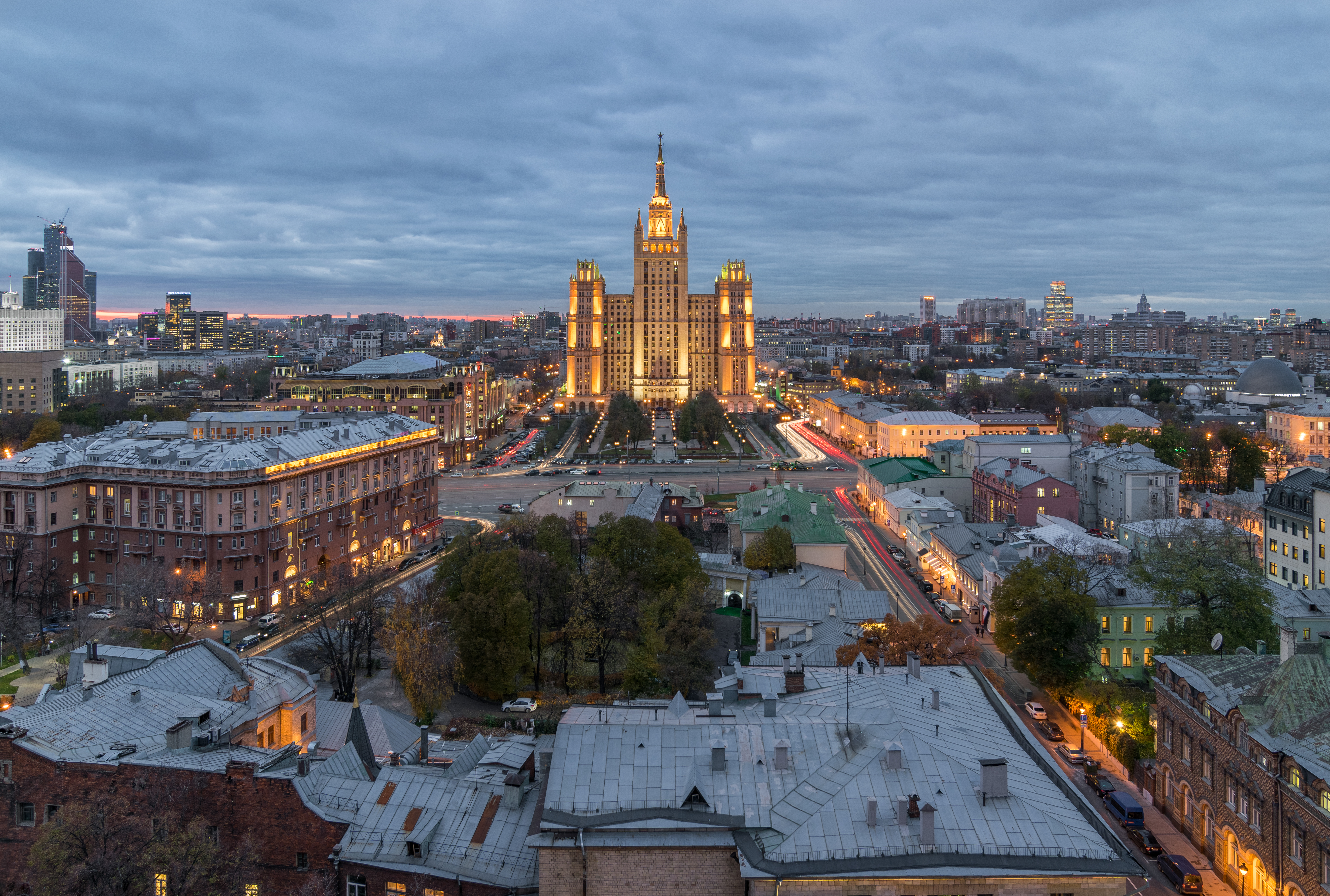 Жилой дом: Кудринская пл., дом 1, Пресненский, Центральный округ, Москва